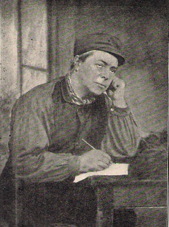 Walon: Portrait (foto) da Jacques Bertrand prinjhe pa Prosper_Bévierre